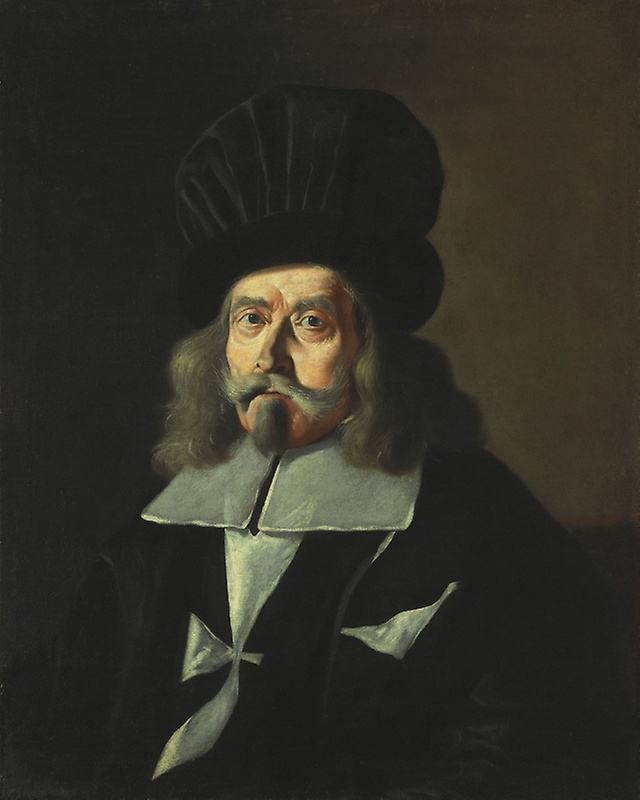 Ritratto del Gran Maestro dell'Ordine dei Cavalieri di Malta Martin de Redin